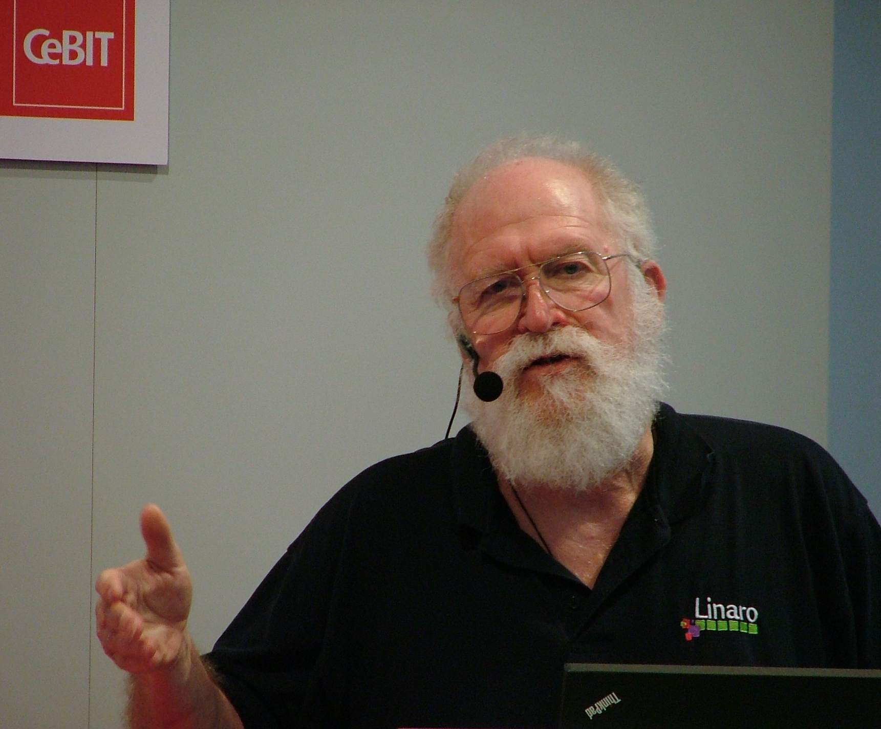 Jon Hall auf der CeBIT 2015 in Hannover